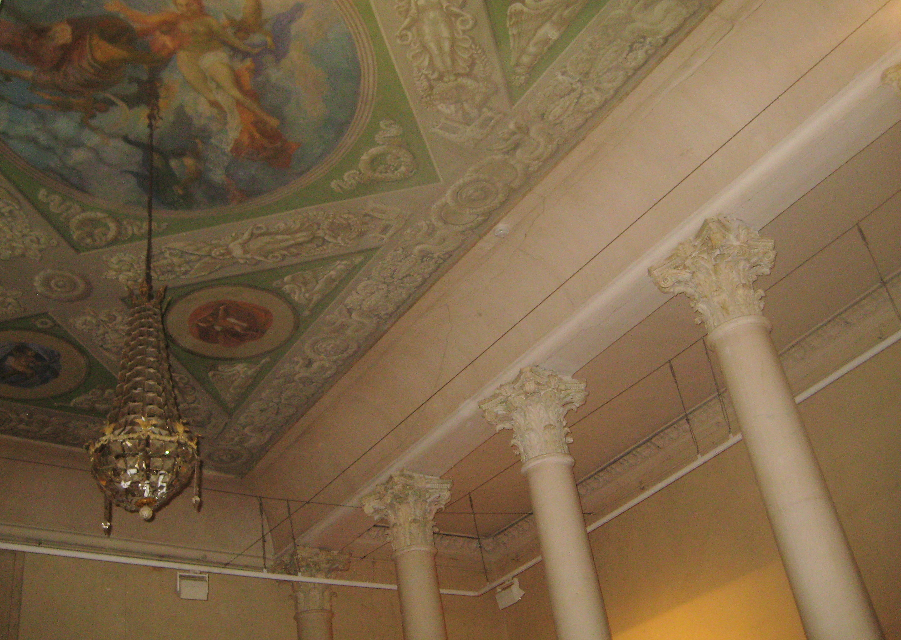 МУАР